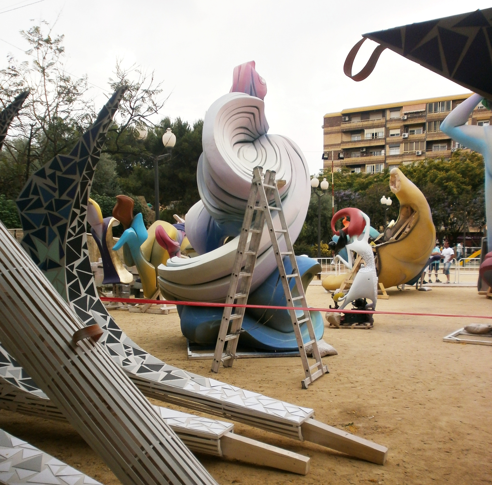 Imagen de la plantá de una hoguera de San Juan en Alicante, España.